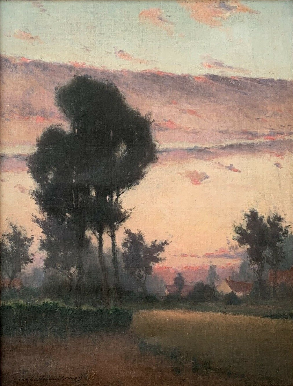 Painting from the Flamish Callebaut in 1915: Sunset